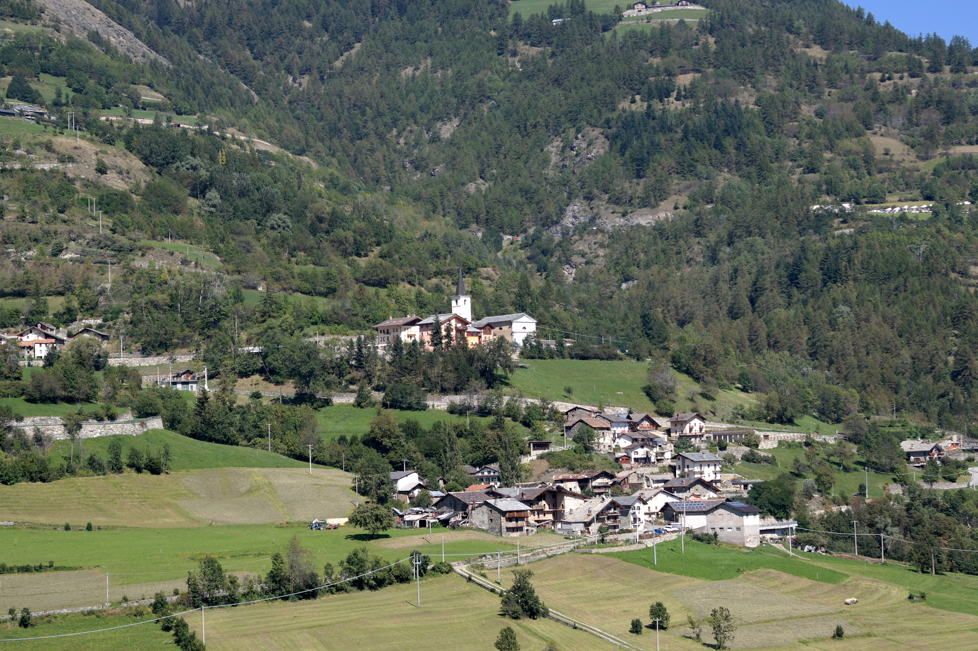 Veduta di Allein in Val d'Aosta